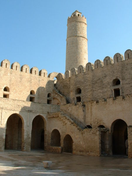 Photographie personnelle prise à Sousse, à l'intérieur du ribat, dont on voit la tour, et des cellules ouvertes sur la cour intérieure